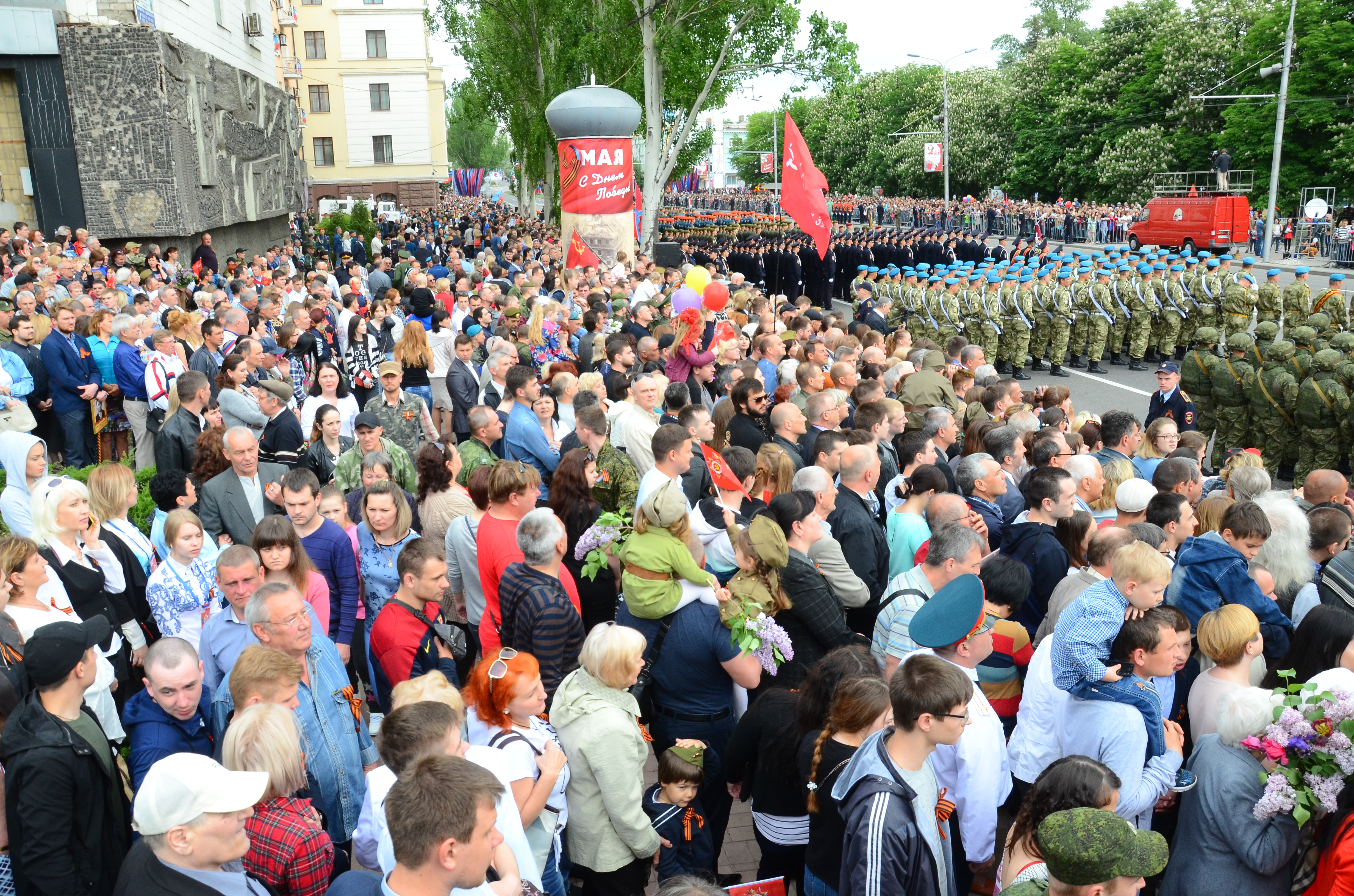 День Победы в Донецке